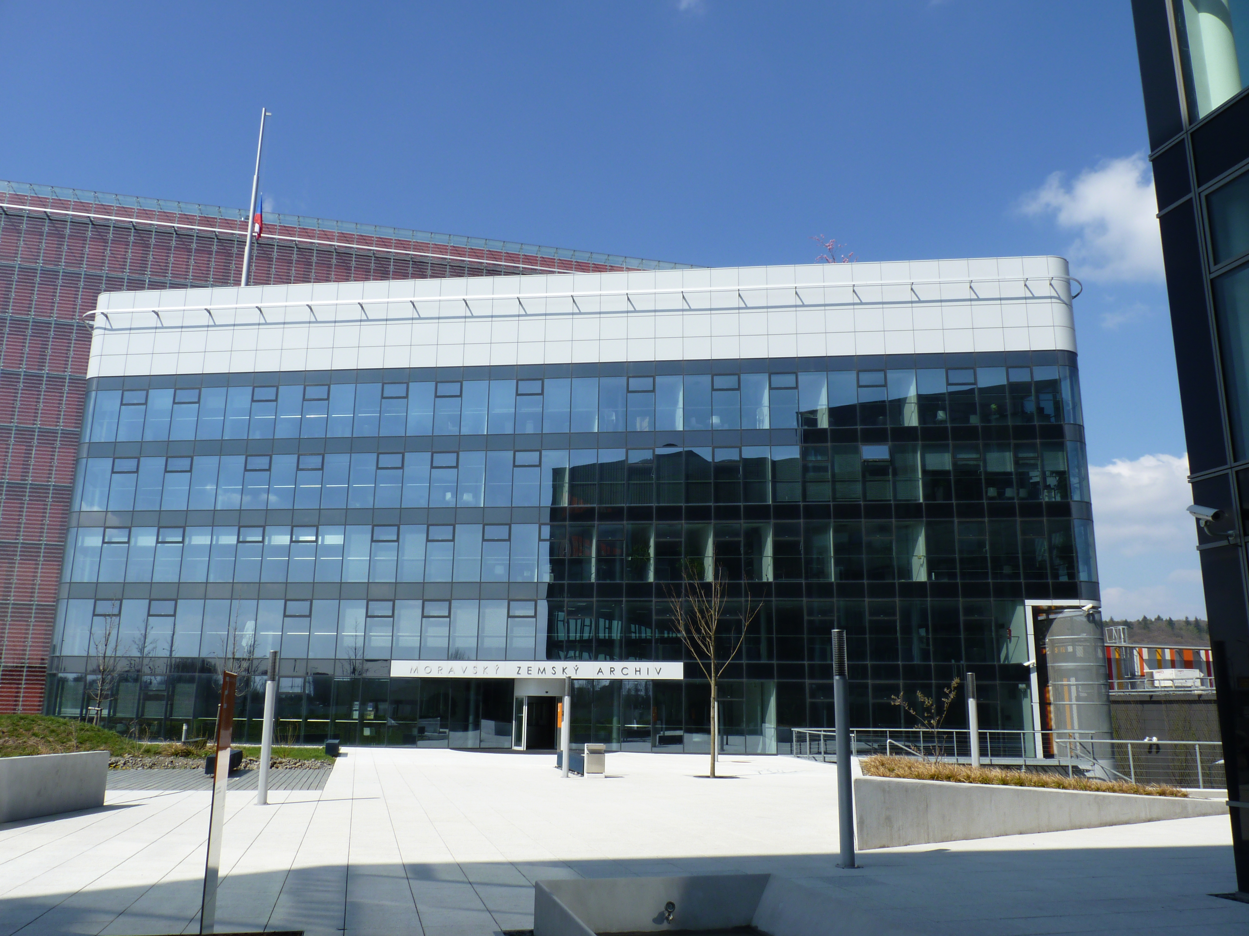 Nová budova Moravského zemského archivu, Brno